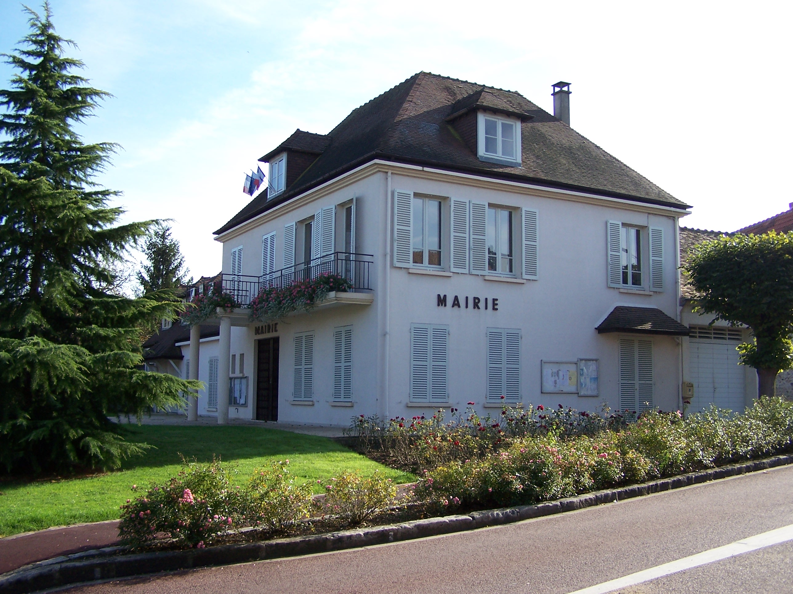 Mairie de Méré (Yvelines, France)